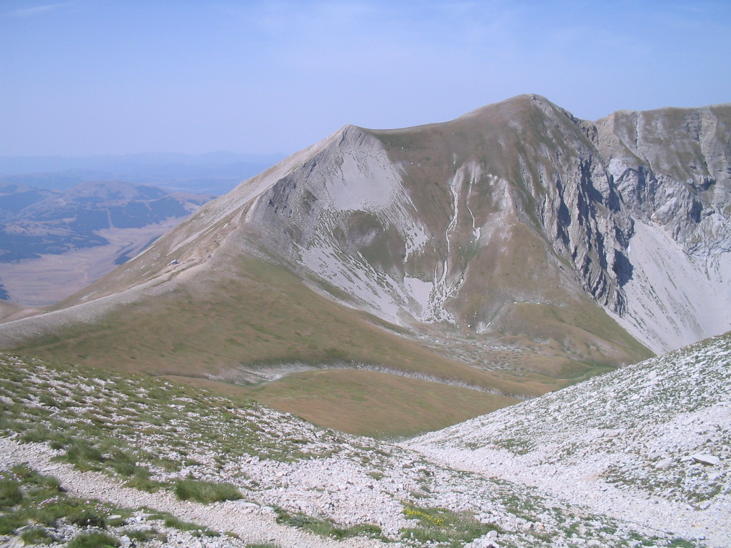 Cima del Redentore (monti Sibillini) fotografata dal Vettore.